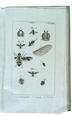 Plate from Schellenberg, J.R. Gattungen der Fliegen in XLII. Kupfertafeln entworfen und gezeichnet. Zürich, Orell, Fuesli und Compagnie, 1803.